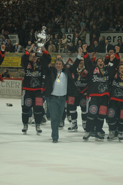 Beschreibung: Mannschaft des Duisburger EV mit Didi Hegen Quelle: Raymond Tellers HP Fotograf/Zeichner: Raymond Tellers Datum der Aufnahme: 2005 Freigabe siehe Benutzer Diskussion:Vonsoeckchen#Freigabe Bilder Raymond Tellers: "Ich bin mit den GNU-Lizenz einverstanden für den nächsten neun Bilder:-20050417058.jpg -20050417033.jpg -20050506028.jpg -20050506033.jpg -20050509007.jpg -20050510001.jpg -20050511002.jpg -20050512004.jpg -20050514008.jpgMit freundlichen Grüsse,Raymond Tellers" 12:23, 10. Jun 2005 Vonsoeckchen 426 x 640 (74423 Byte) ( GFDL Freigabe * Beschreibung: Mannschaft des Duisburger EV * Quelle: [ Raymond Tellers HP] * Fotograf/Zeichner: Raymond Tellers * Datum der Aufnahme: )